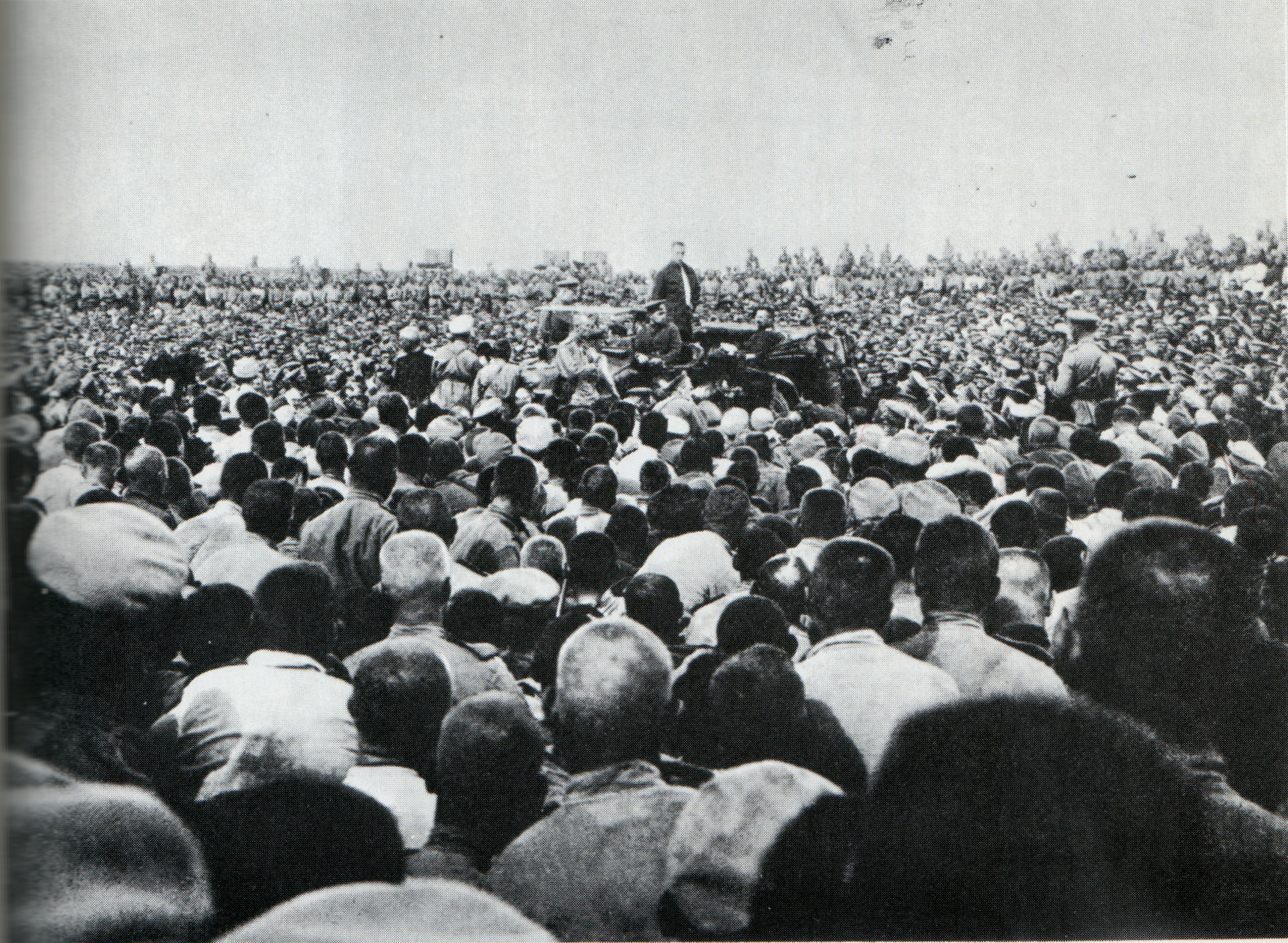 Kérenski arenga a las tropas en las vísperas de la ofensiva de junio de 1917.